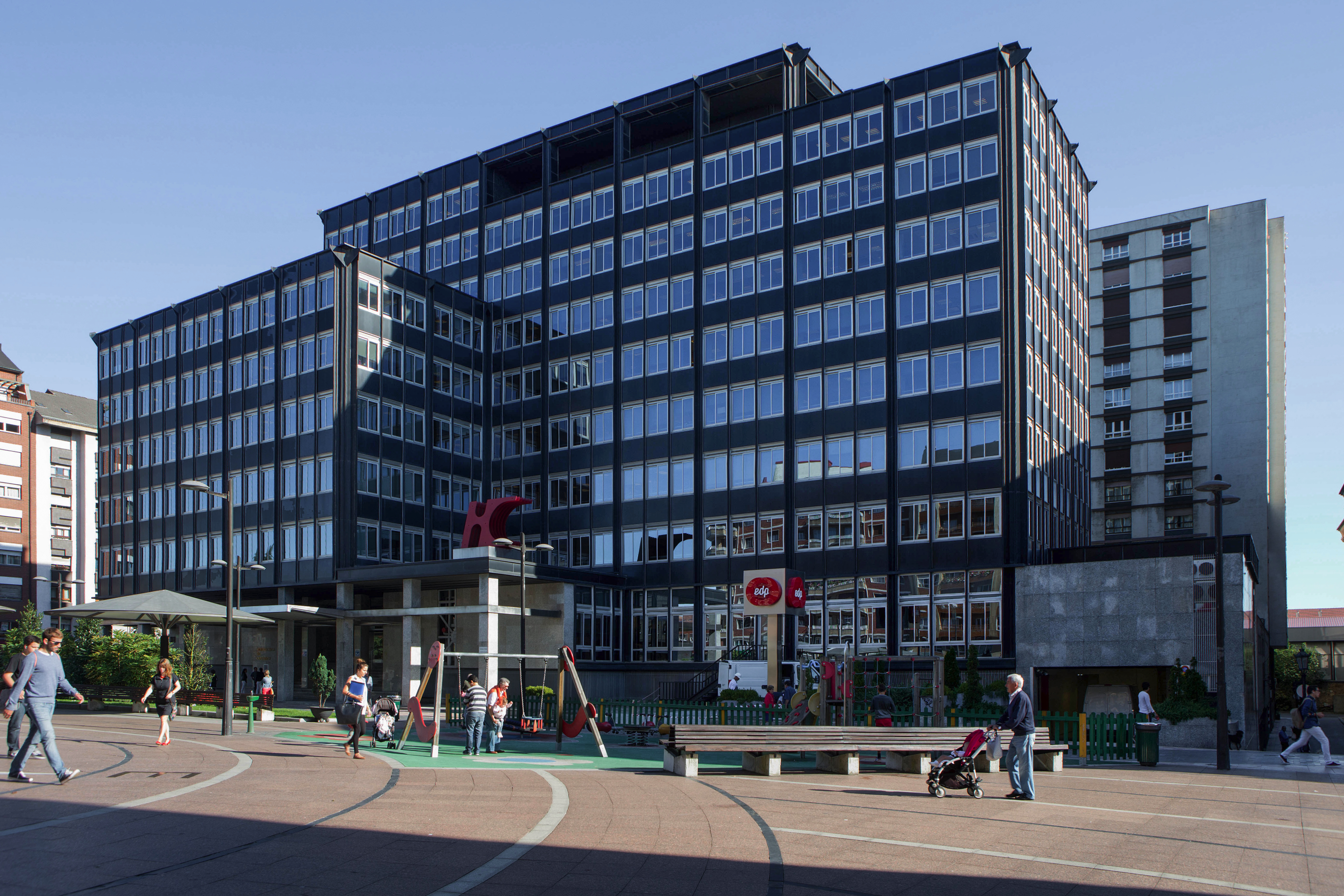 Edificio sede EDP España en Oviedo